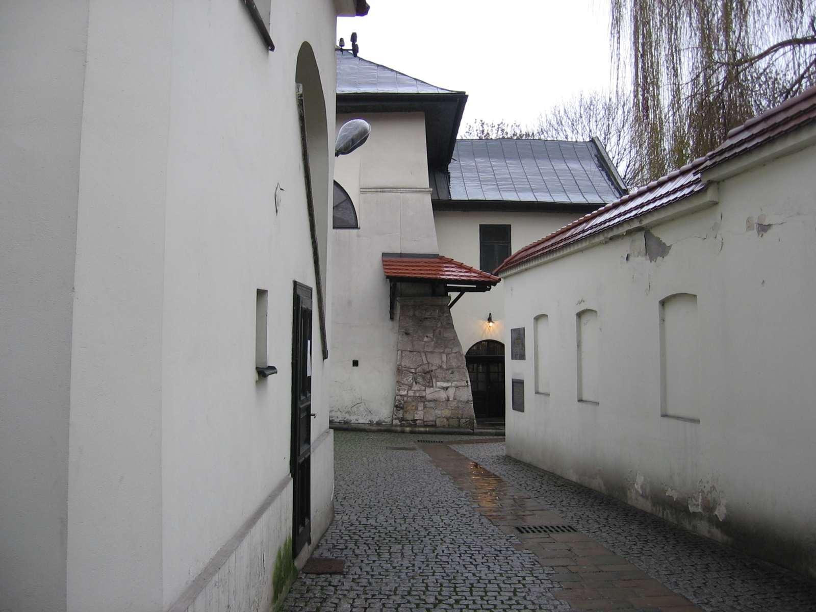 Synagoga Remuh w Krakowie Author: Wikipedysta:Birczanin